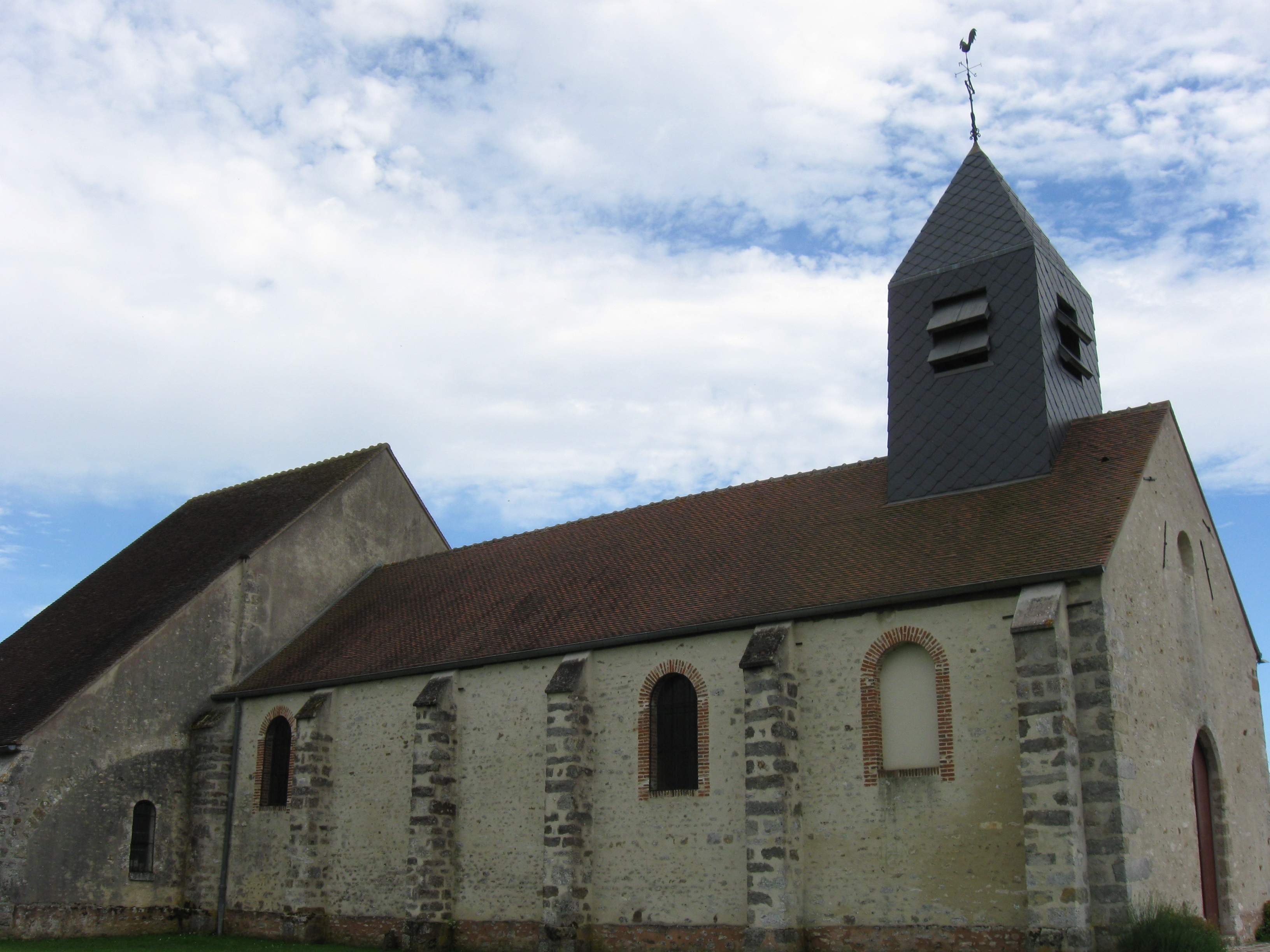 Église Saint-Martin de Courtacon. (Seine-et-Marne, région Île-de-France).